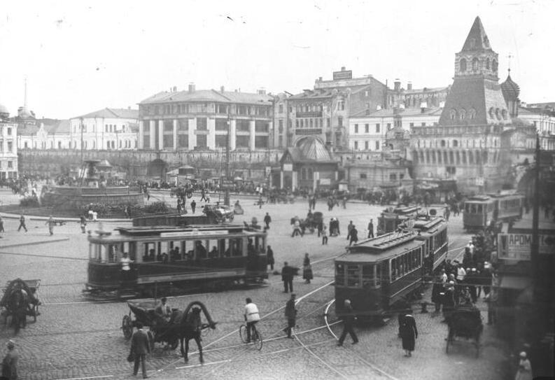 Moskau, die Hauptstadt Russlands, von heute! Der Lubjana-Platz in der Mittagszeit mit seinem Leben und Treiben. Im Hintergrund ein Stück der weltbekannten Mauer von Kitaj-Gorod.